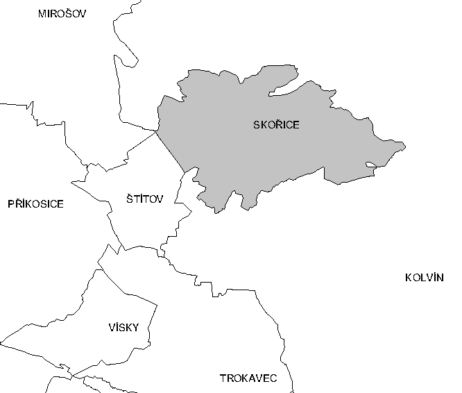 Katastr Branišova